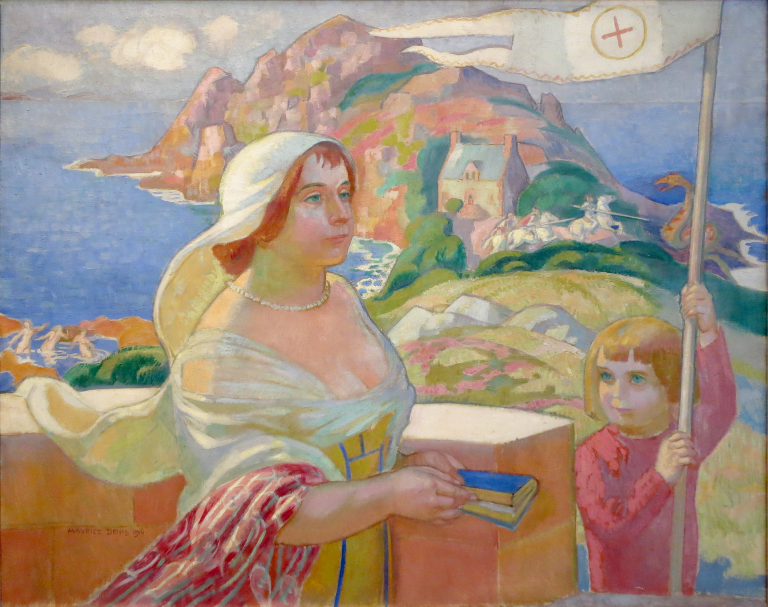 La princesse dans la tourtitle QS:P1476,fr:"La princesse dans la tour" label QS:Lfr,"La princesse dans la tour"